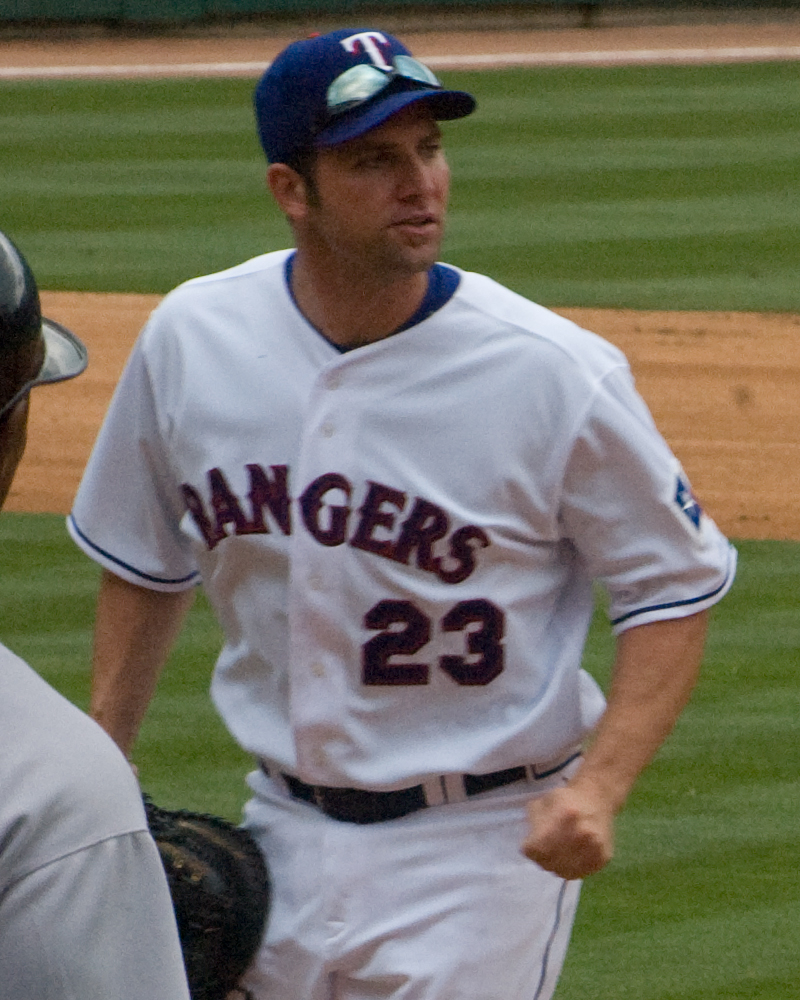 Ben Broussard